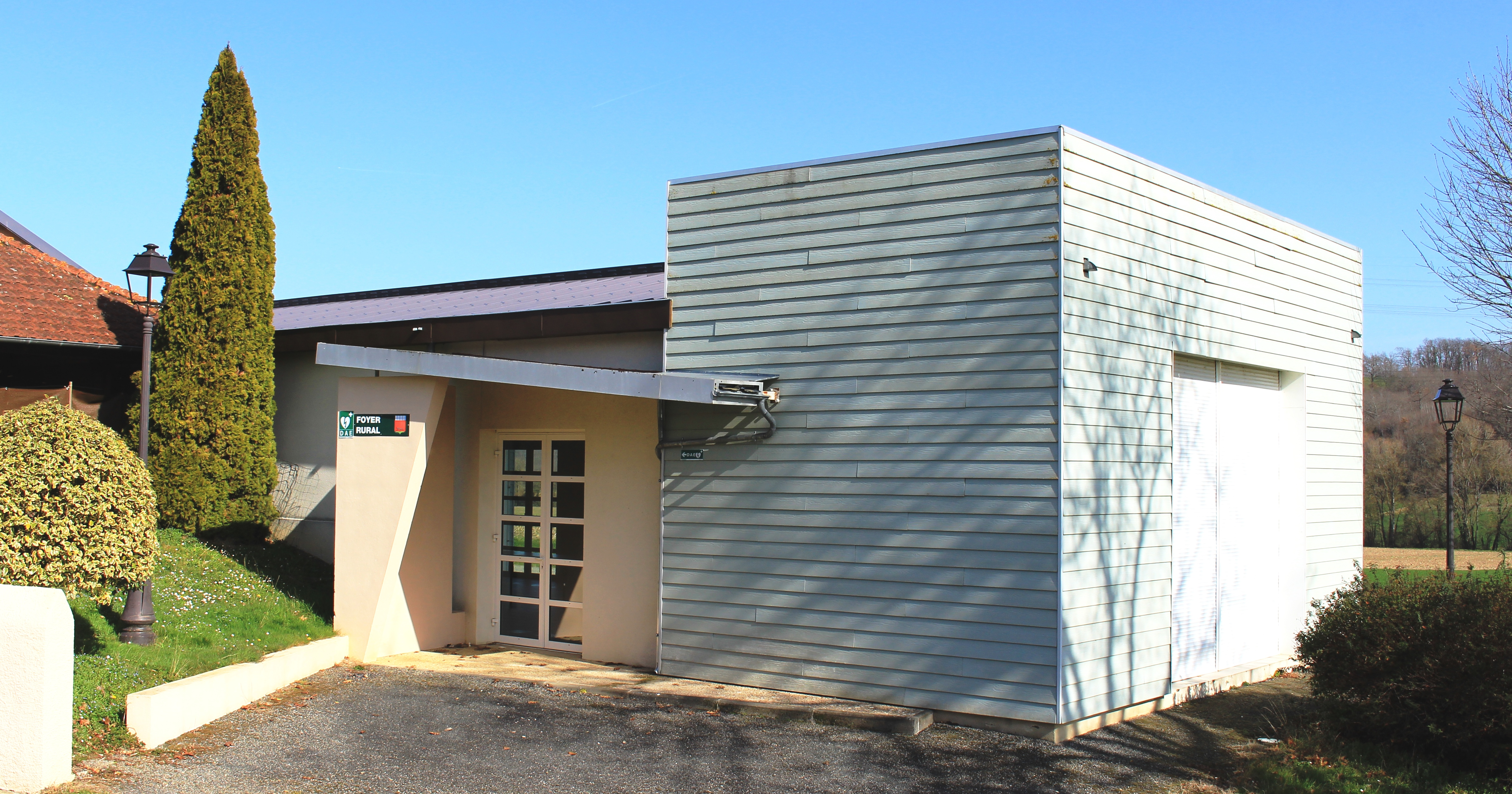 Foyer rural de Moumoulous (Hautes-Pyrénées)